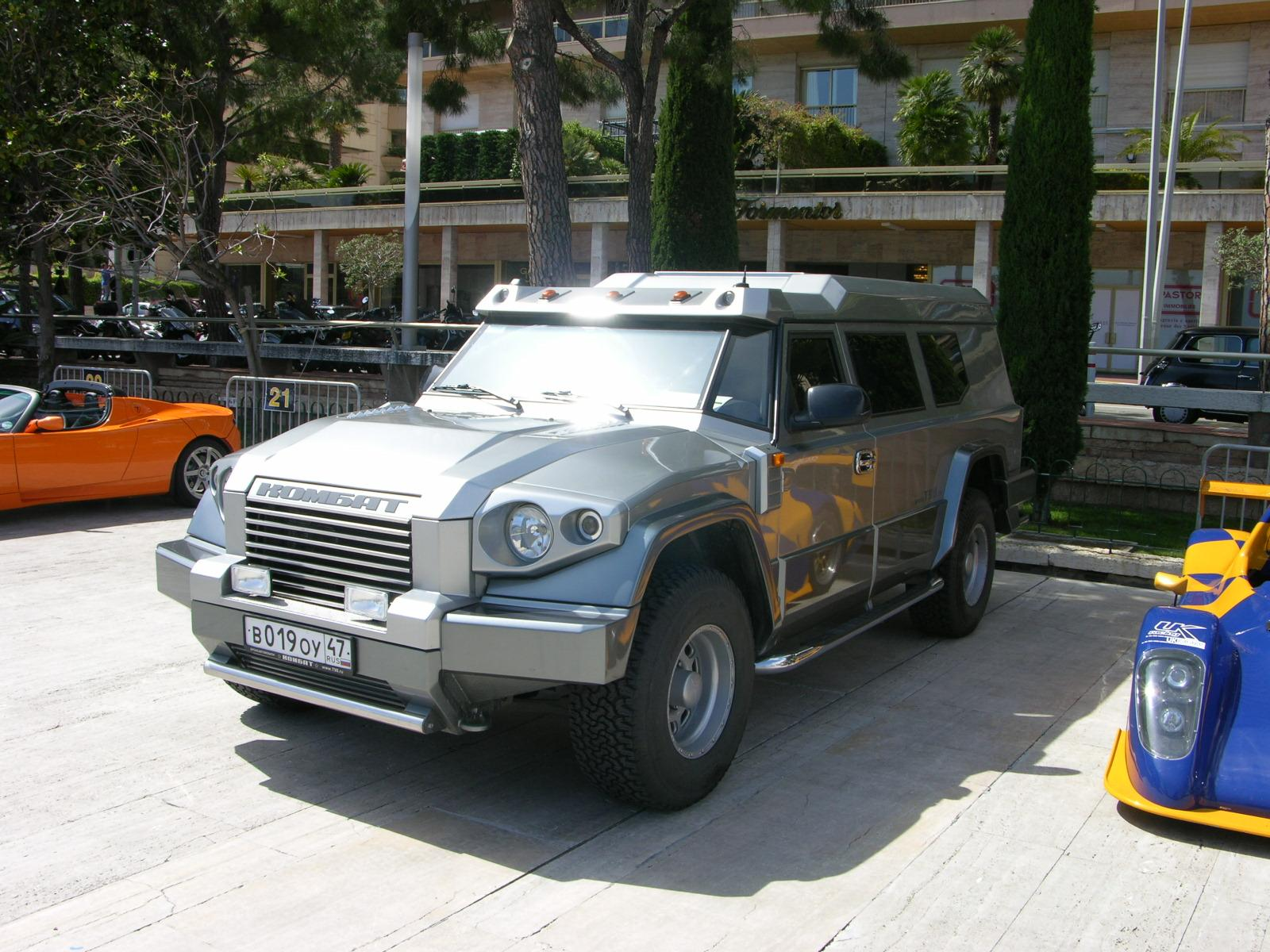 Dartz